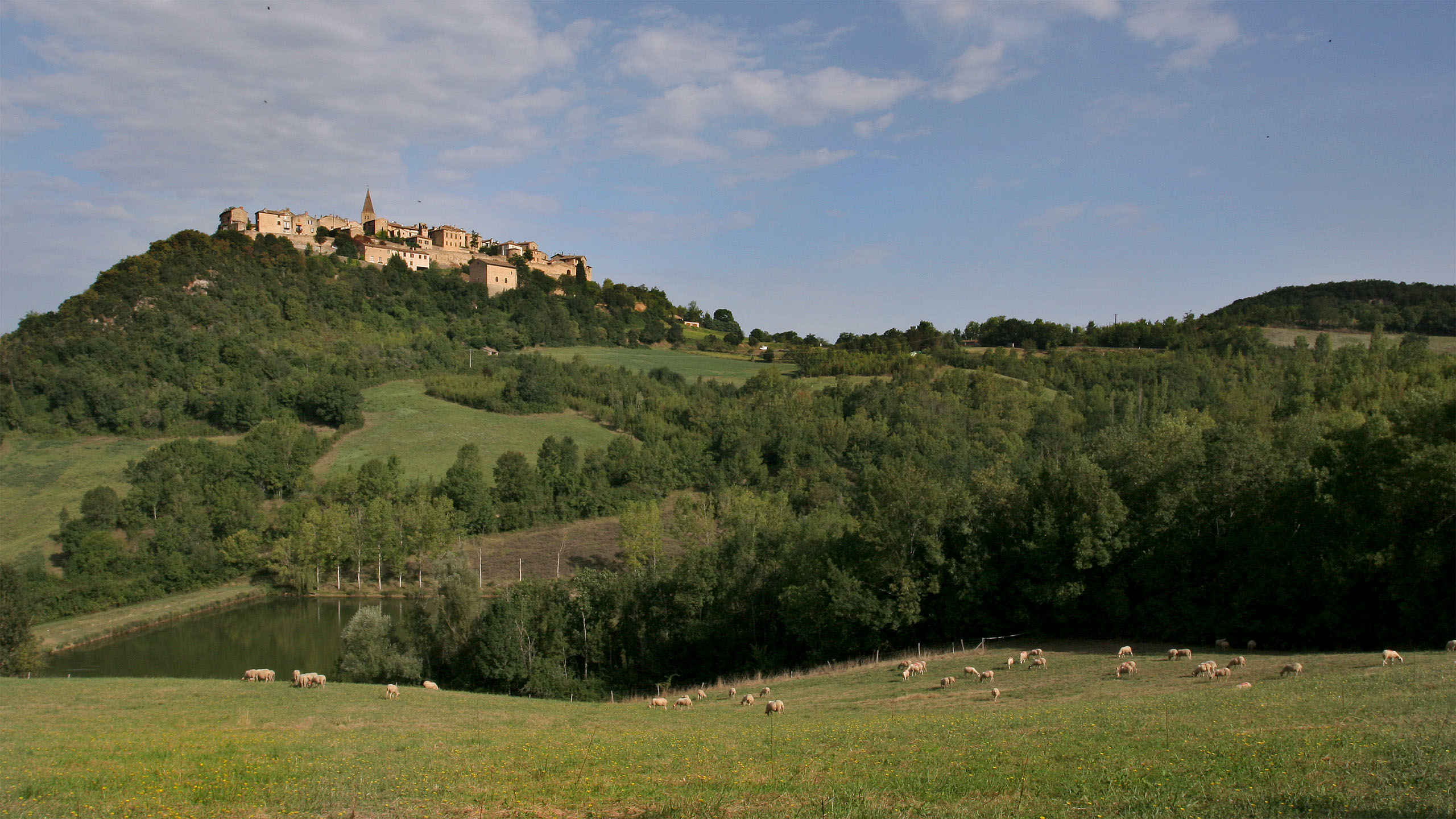 Vue générale du sud